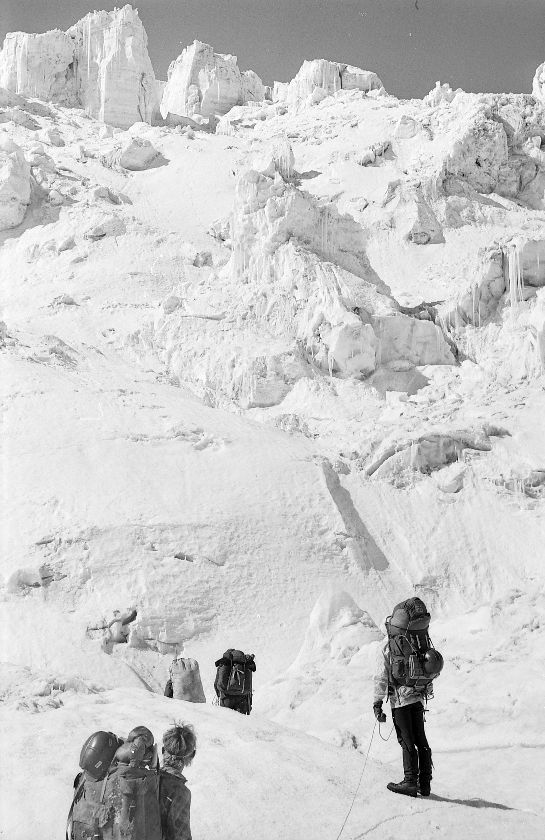 Ekspeditsioon mäetipule "Tartu Ülikool 350".